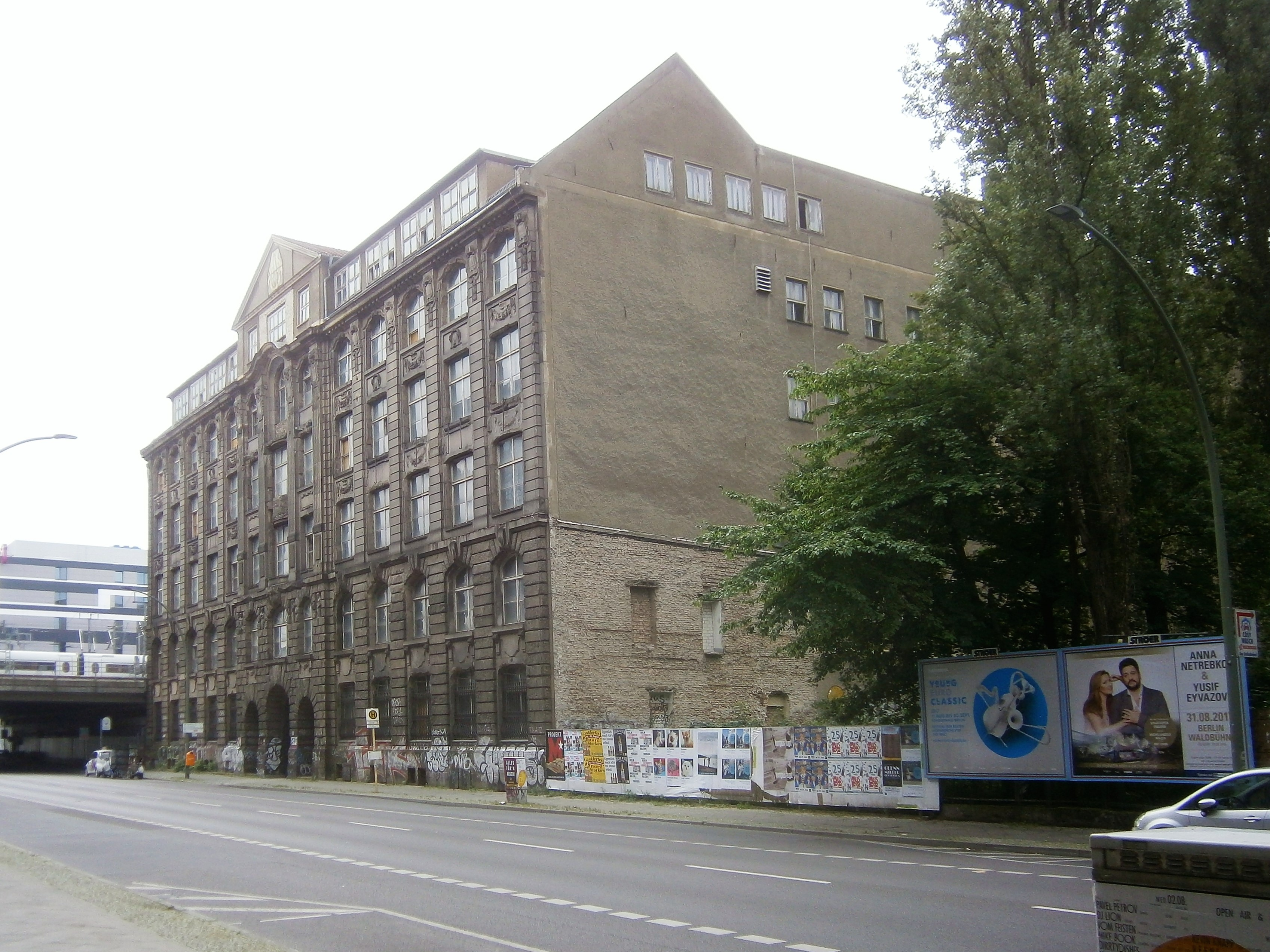 Die Andreasstraße ist eine Straße im Berliner Bezirk Friedrichshain-Kreuzberg, Ortsteil Friedrichshain. Angelegt wurde sie 1862 auf vorherigen Gartenland und 1863 benannt. Bis um 1900 waren die Grundstücke bebaut und bis 1930 wurde verdichtet. Bei Luftangriffen im Zweiten Weltkrieg wurde die Gebäude schwer getroffen. So ist die Straße seit den 1950er Jahren mit wiederhergestellten Altbauten, aber besondres durch Plattenbau-Wohnblöcke aber seit 1990 auch durch Hotel- und Bürobauten im Umfeld des Ostbahnhofs charakterieisiert. Das Bild zeigt den noch unsanierten denkmalgeschützten Verwaltungsbau der ehem. Julius-Pontsch AG Andreasstraße 71-73 ab Ecke Langestraße